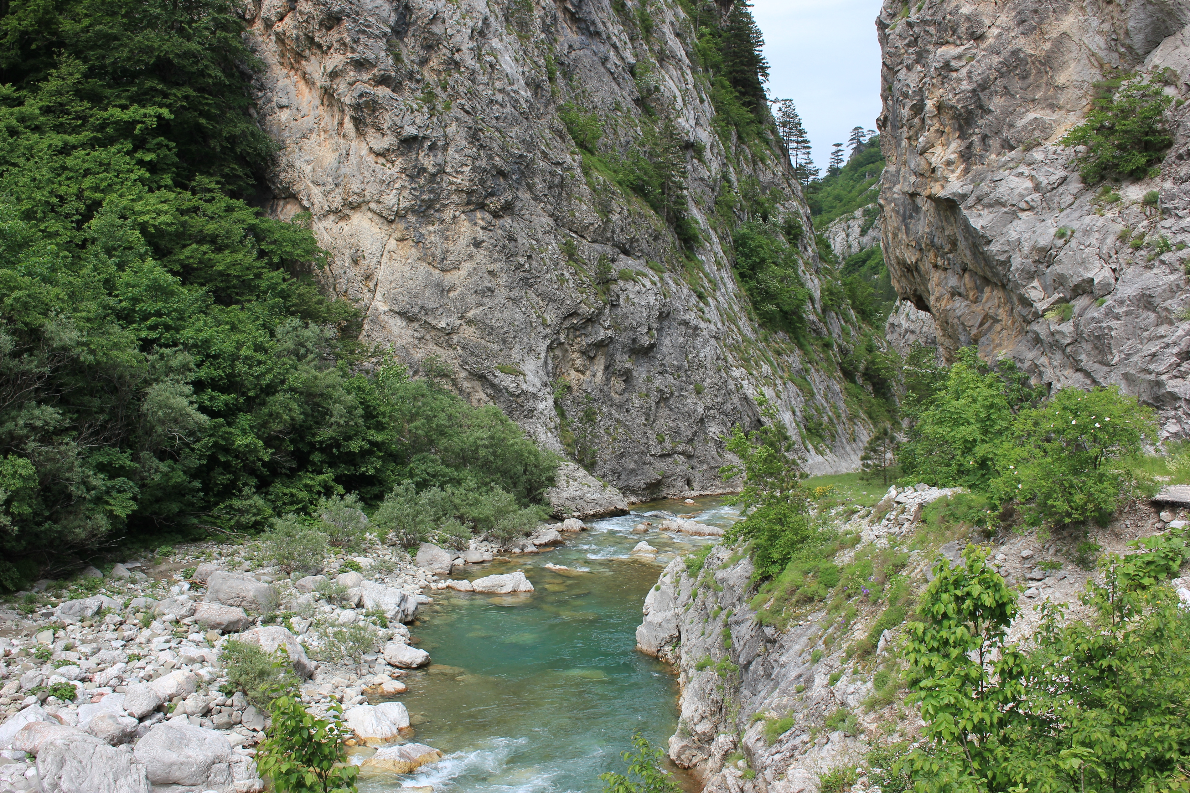 An der Sutjeska südlich von Tjentište.